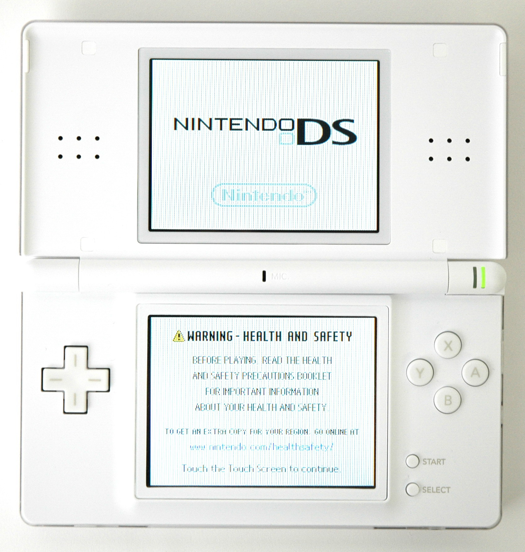 Top view of Nintendo DS Lite.